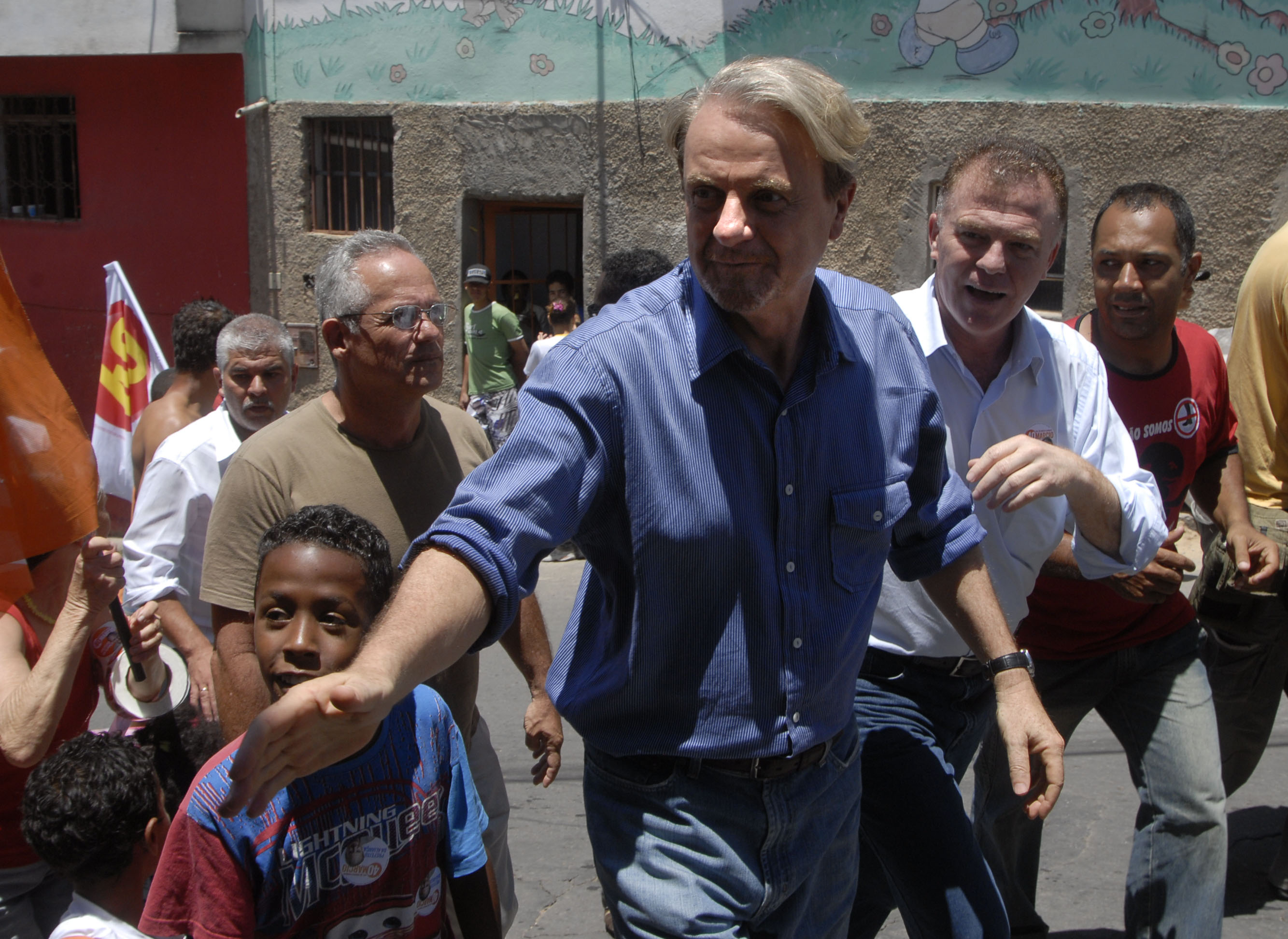 O político brasileiro Márcio Lacerda